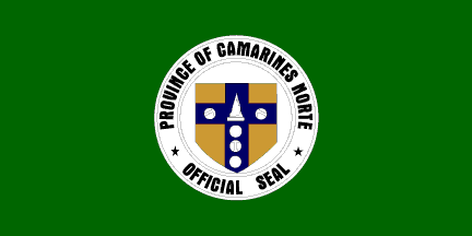 Dit materiaal is afkomstig van of en is door de auteur Jaume Ollé als GFDL beschikbaar gesteld, zie de toestemmingsemail. Hiermee vervallen de strictere voorwaarden in de disclaimers op de genoemde sites.Vrijgegeven bijdrage op Flags of the World van Jaume Olle. Zie deze verklaring op de Spaanstalige Wikipedia. GNU FDL